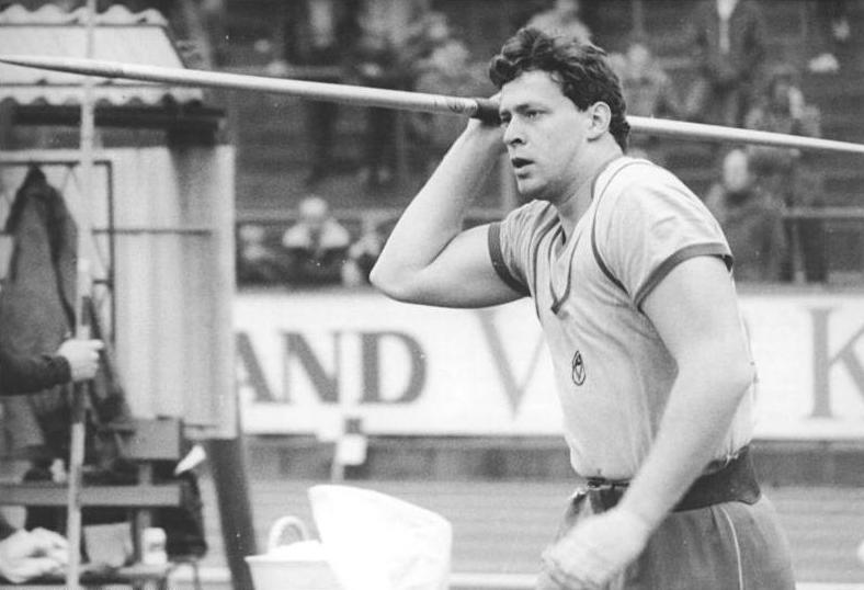 Uwe Hohn ADN-ZB Kasper 13.5.84 Gera: Leichtathletik-Sportfest in Jena- Vor über 2000 Zuschauern in Jenaer Ernst-Abbe-Sportfeld verbesserte Speerwurf-Europameister Uwe Hohn (ASK Vorwärts Potsdam) im zweiten Versuch seinen persönlichen Rekord um 3,48 auf 94,82 m. Er mußte im Vorjahr wegen Verletzung pausieren und nimmt nun mit dieser Leistung den 4. Platz der "ewigen" Weltbestenliste ein.